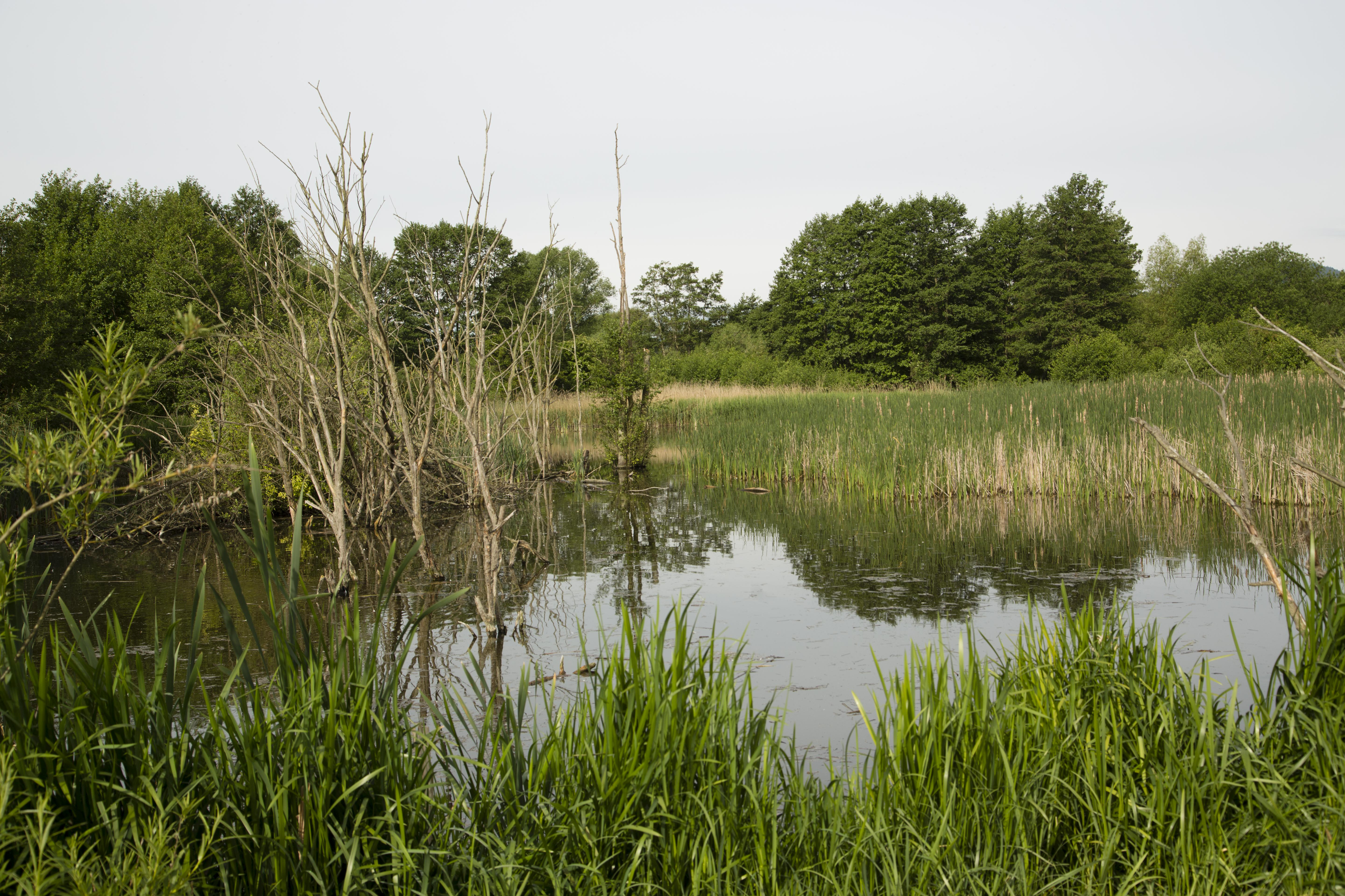 Weiher im Naturschutzgebiet „Thürer Wiesen“, Rheinland-Pfalz